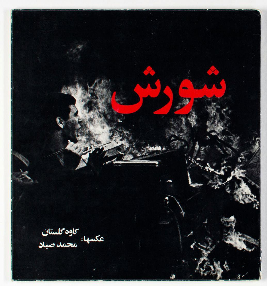 روی جلد کتاب شورش